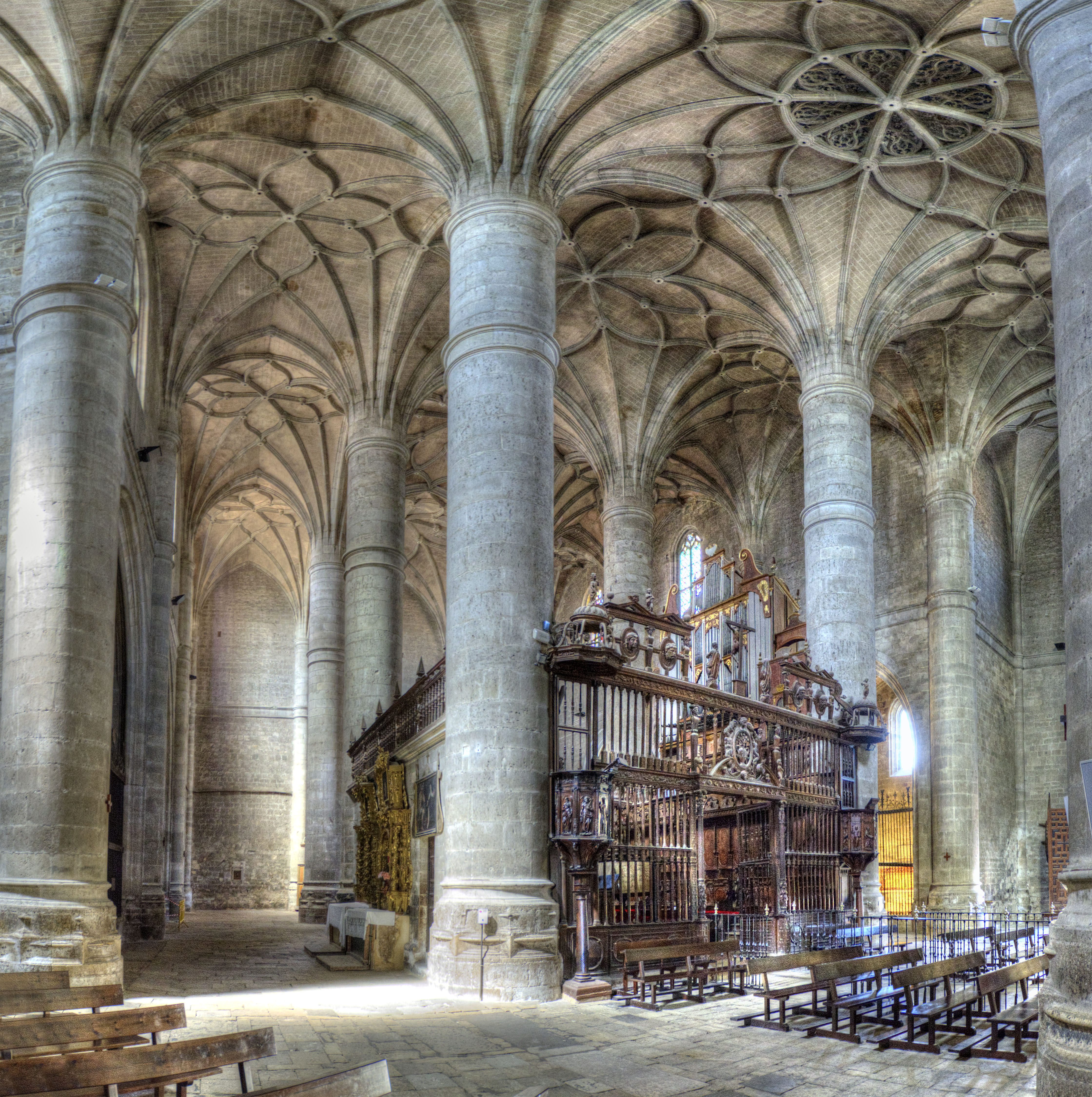 Ubicada en Berlanga de Duero (Soria) se comenzó a construir en 1526 por Juan de Rasines financiada por los señores de Berlanga, María de Tovar e Íñigo Fernández de Velasco.